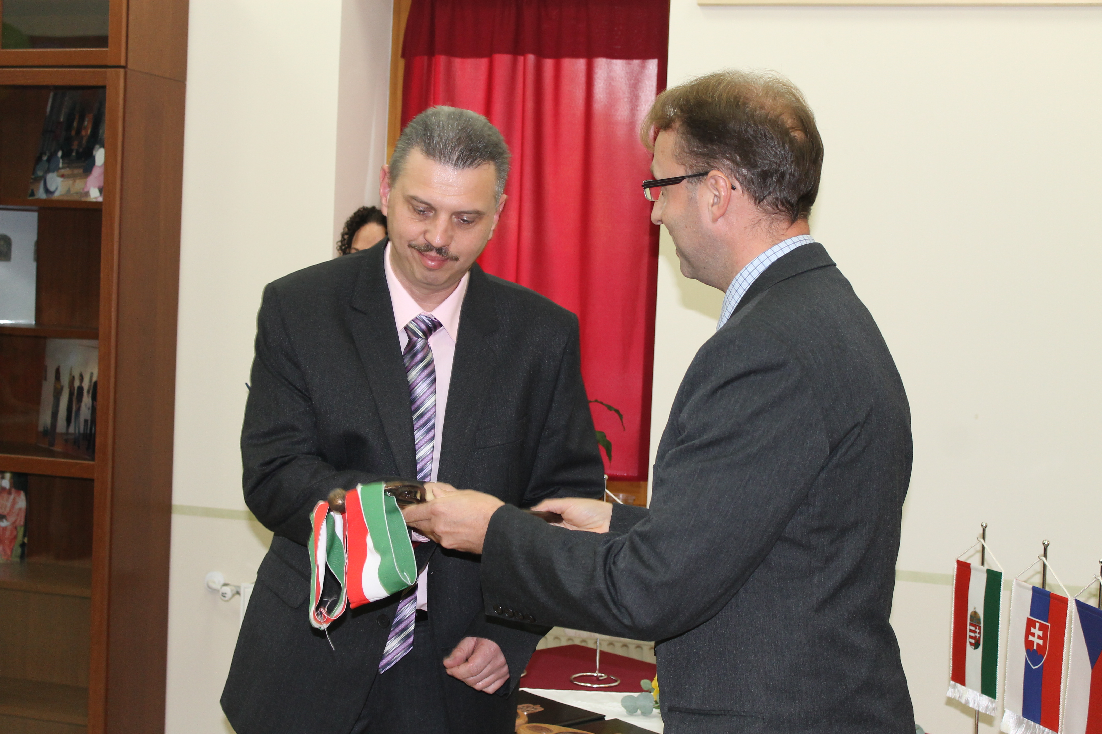 Gáspár Csaba polgármester átveszi a város jelképes kulcsát dr. Tarnay Richárd kormánymegbízottól